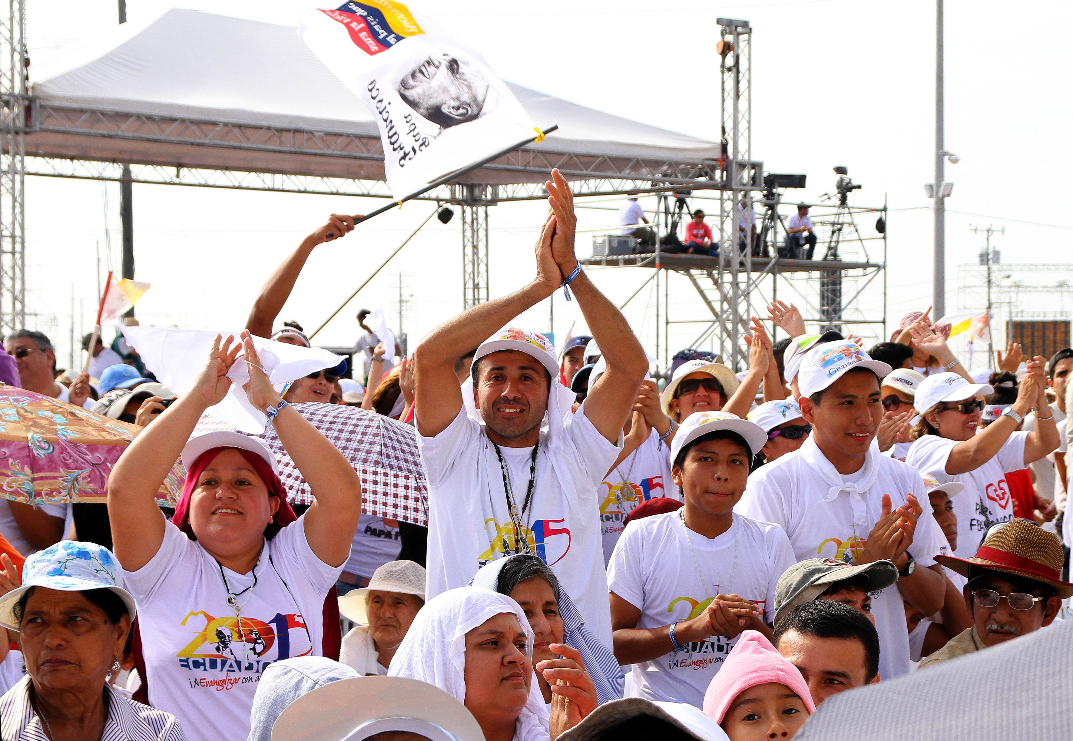 Guayaquil, 06 de jul del 2015 (Andes).-Fieles católicos llegan hasta el campus eucarístico en Samanes donde el papa Francisco I oficiará misa campal Foto:César Muñoz/Andes